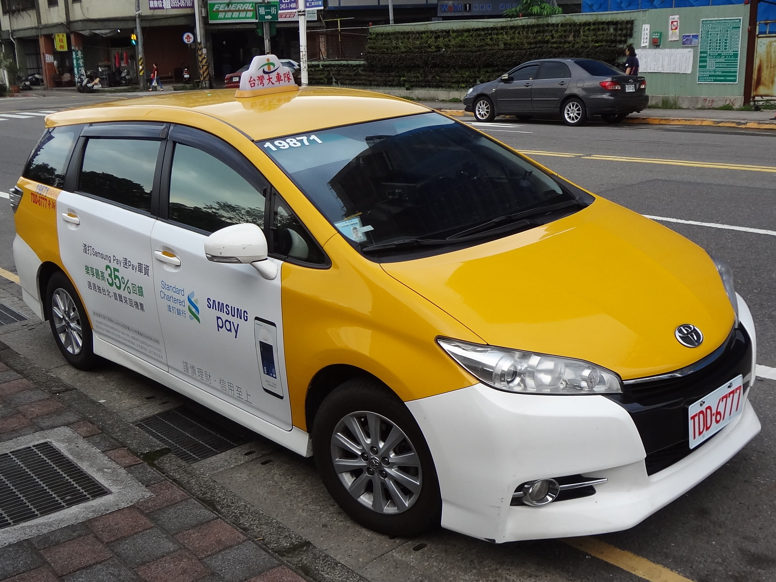 台灣大車隊豐田Wish計程車TDD-6777，右側貼渣打國際商業銀行Samsung Pay廣告。